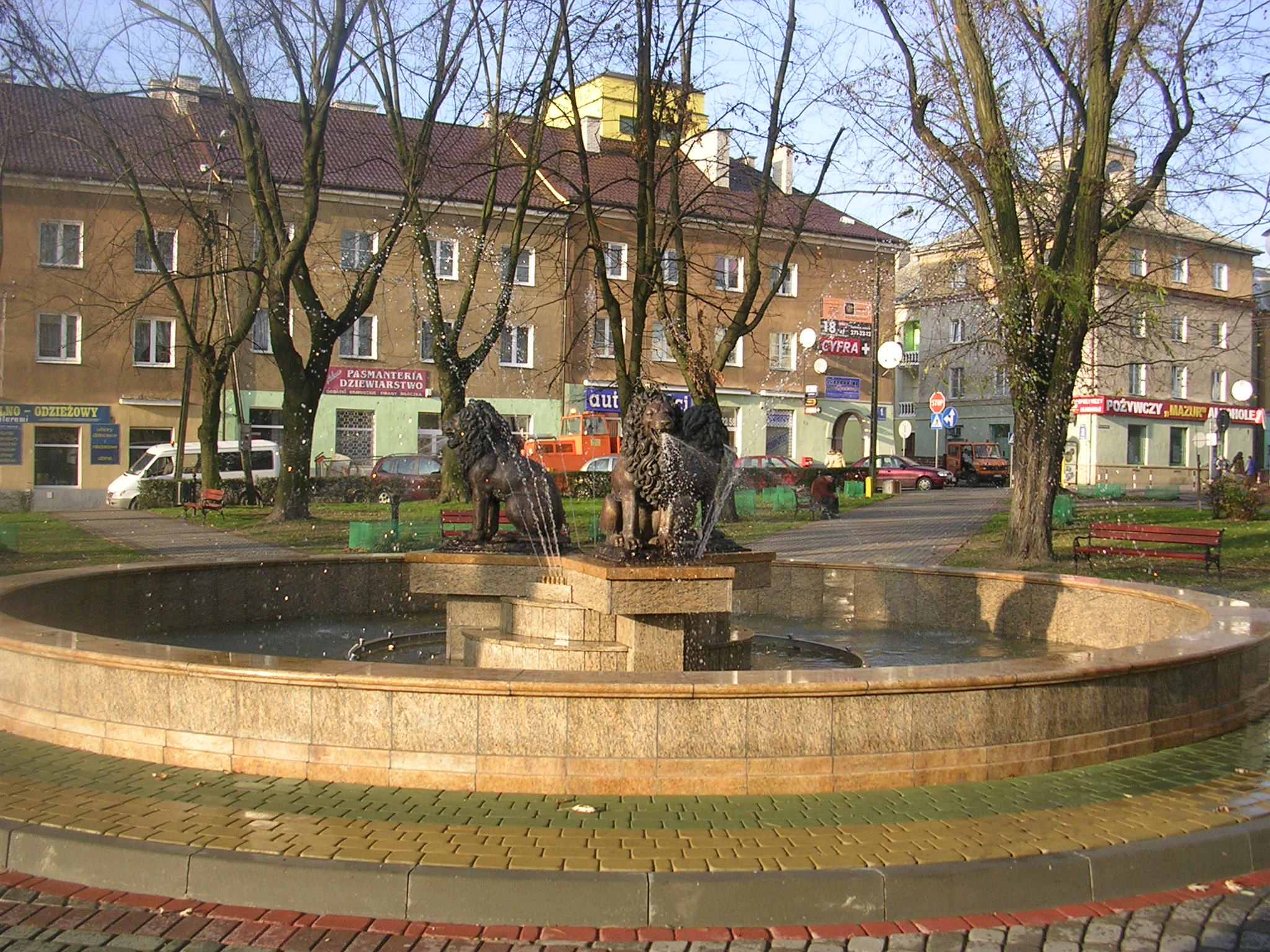 כיכר העיר